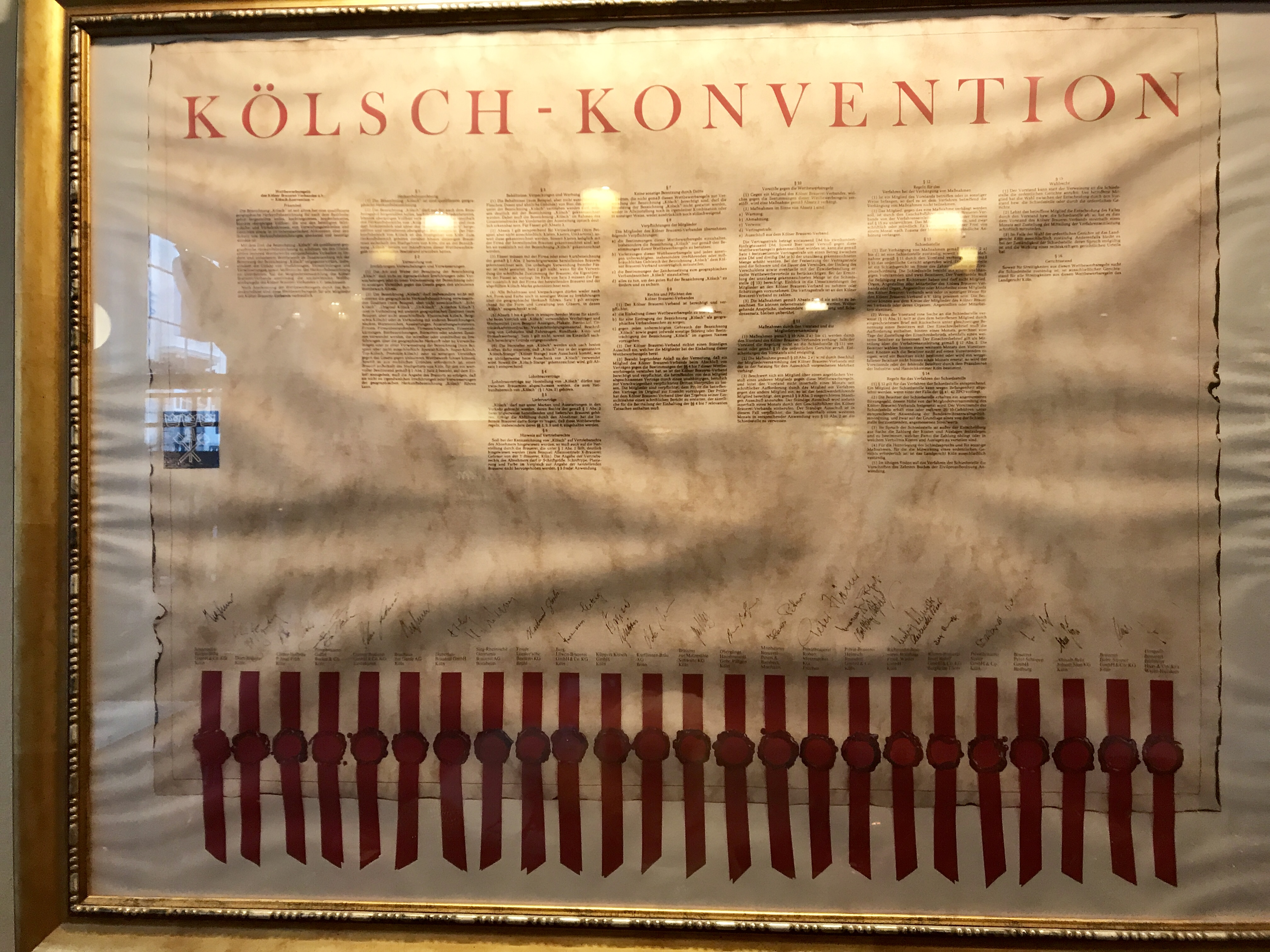 deklarace 26 pivovarů z Kolína